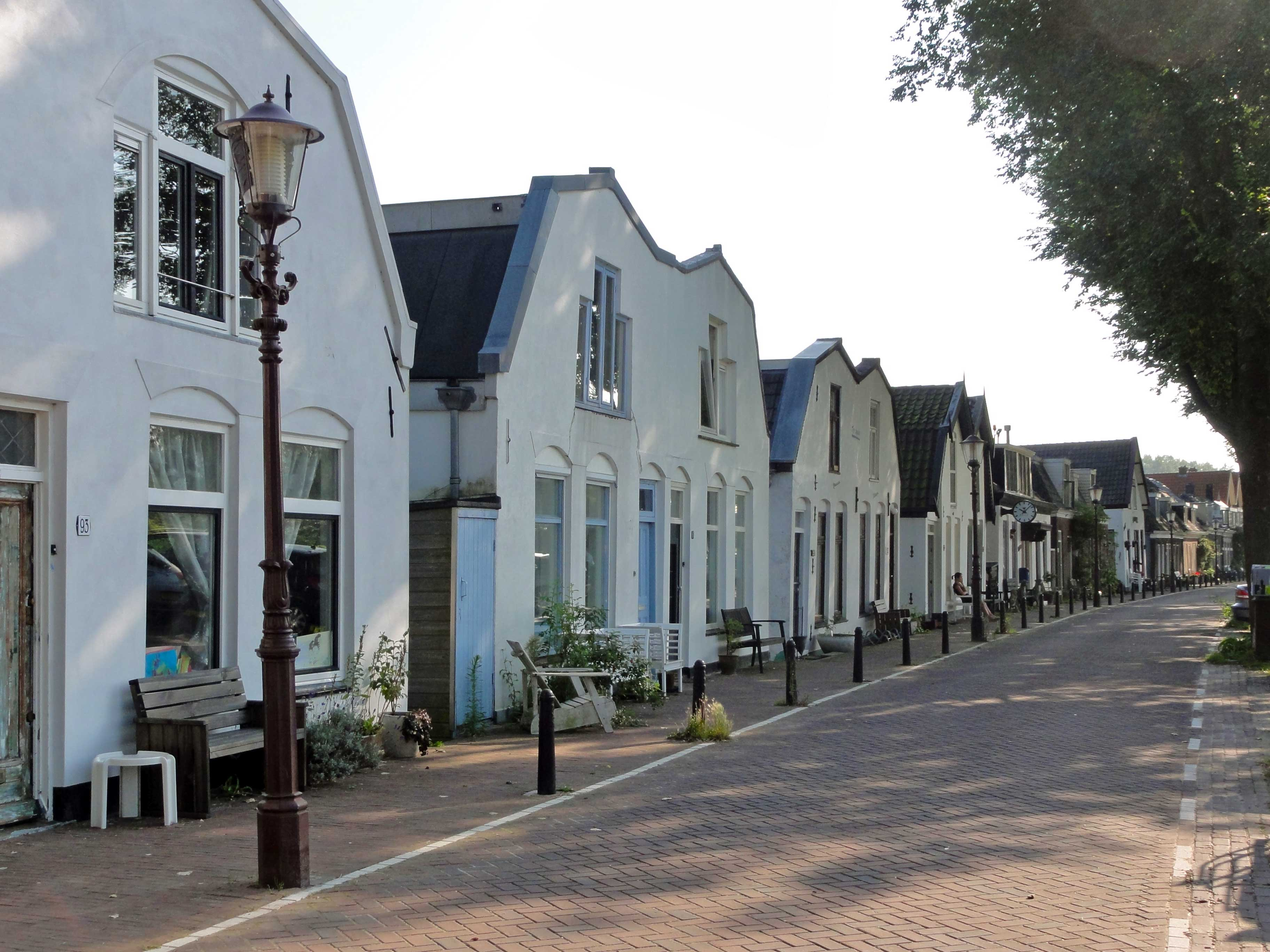 Schelllingwoude - Amsterdam